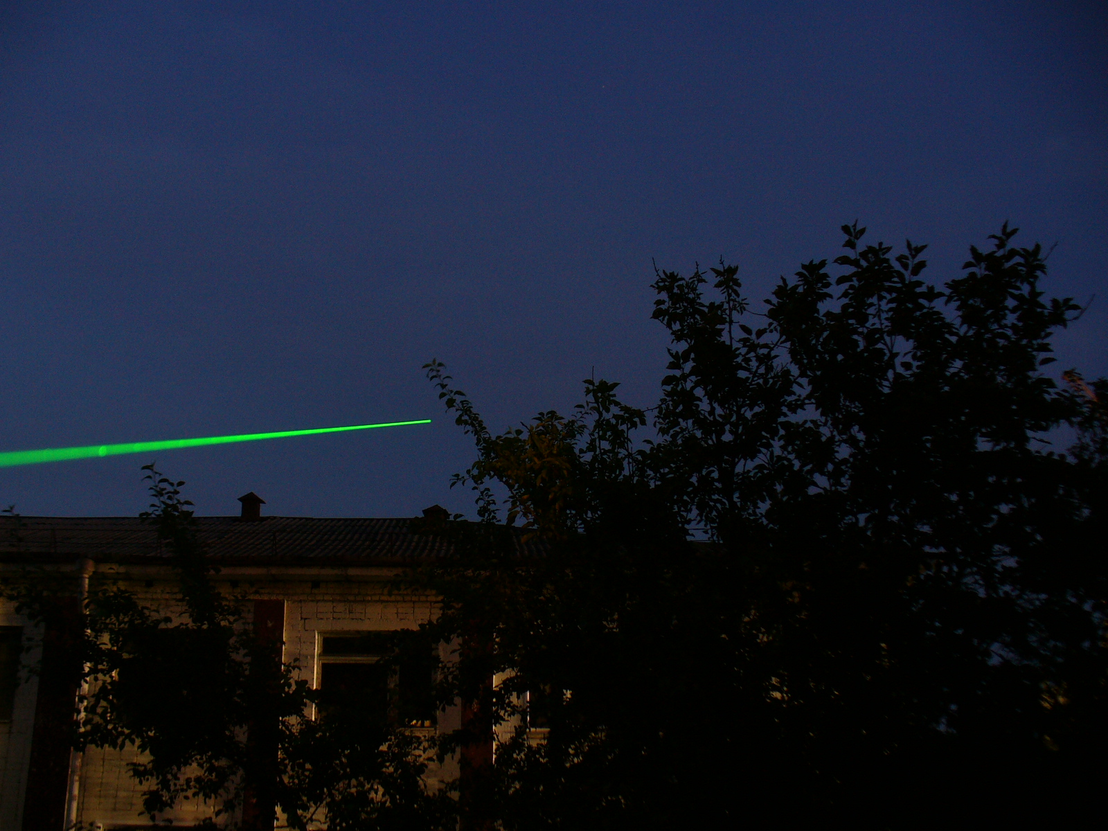 Луч лазера с длиной волны 532нм ночью